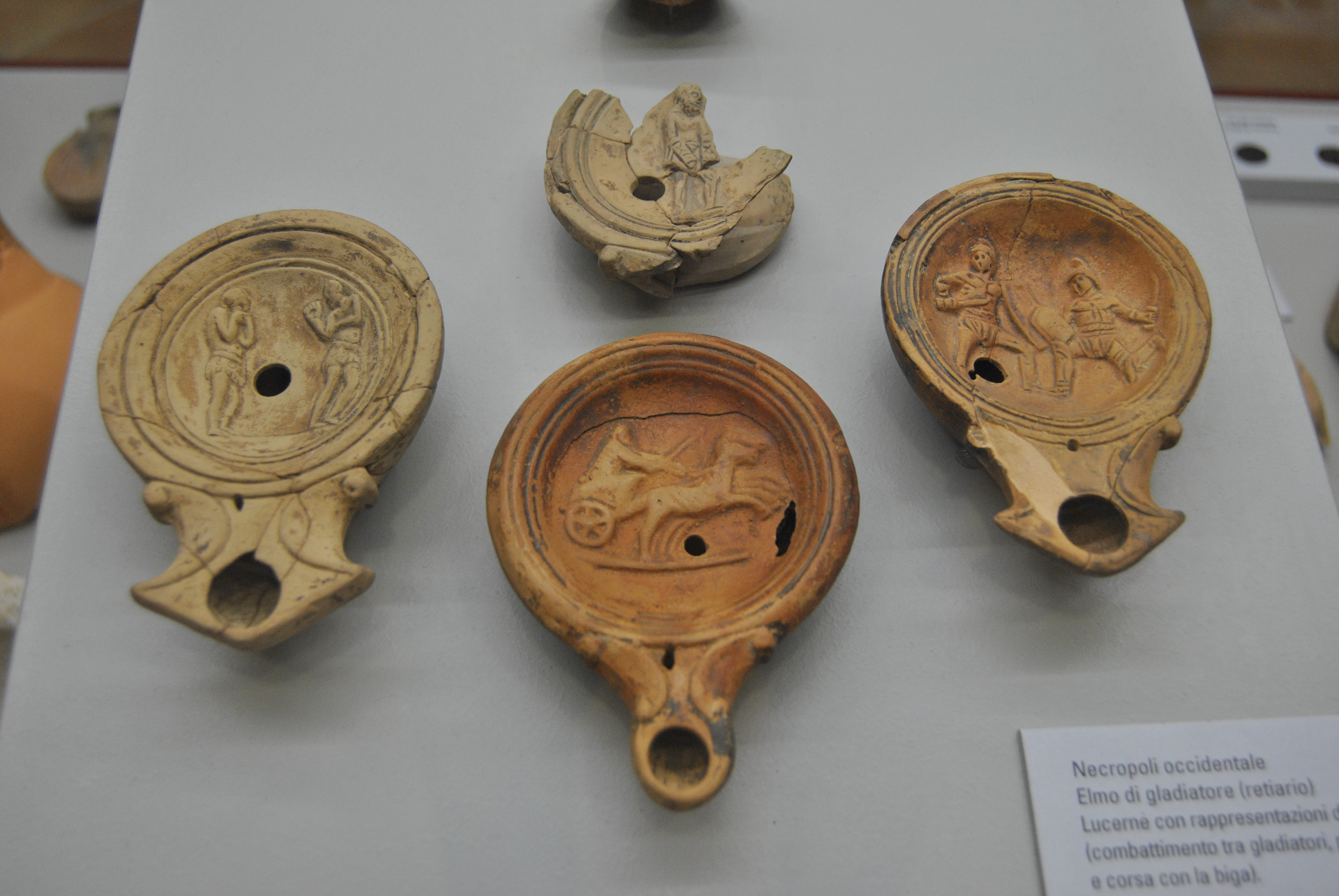 lucerne mac